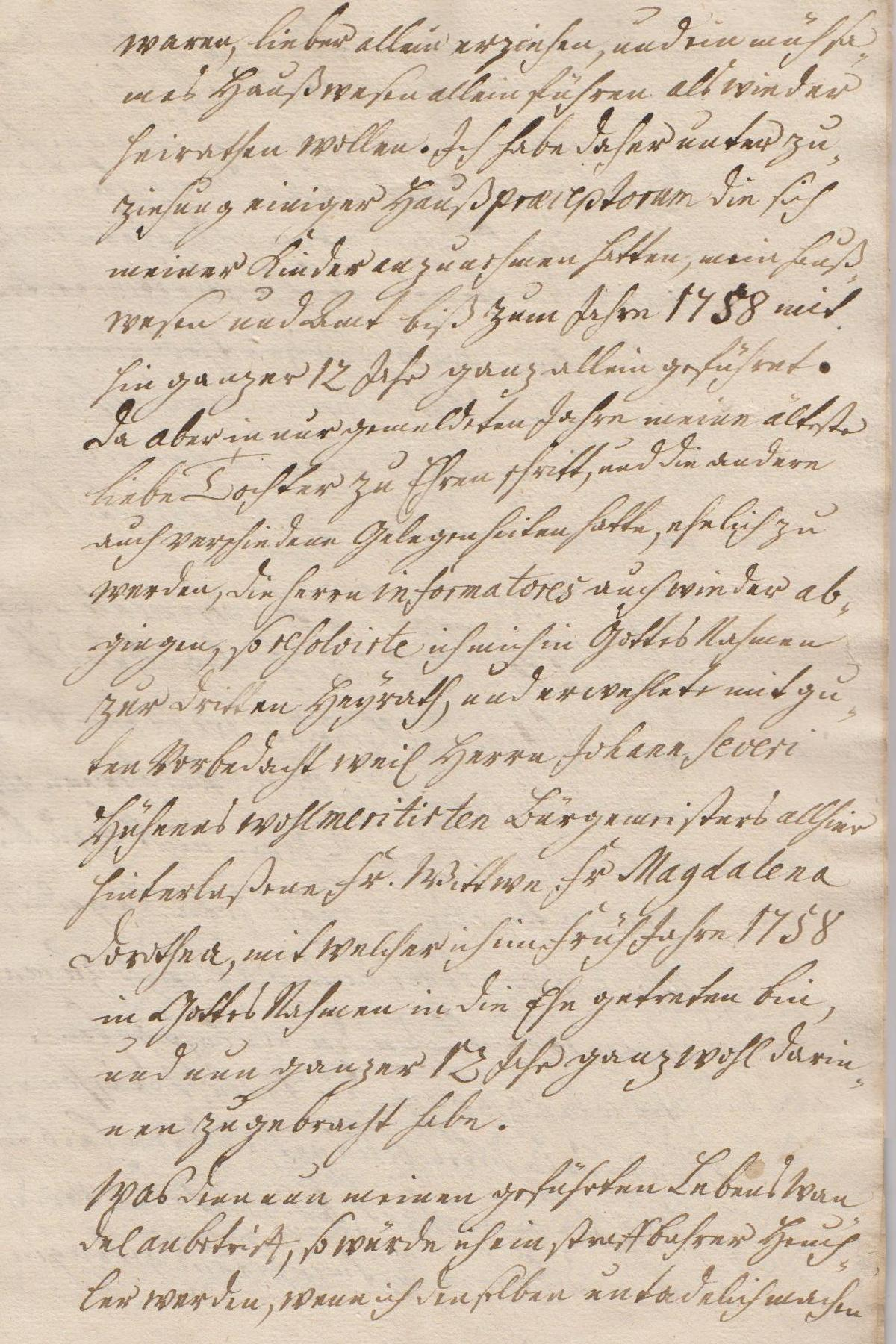 Seite 15 der Leichenpredigt für den Pastor August Wilhelm Reinhart (1696/1770), Bürger der Stadt Heringen an der Helme.